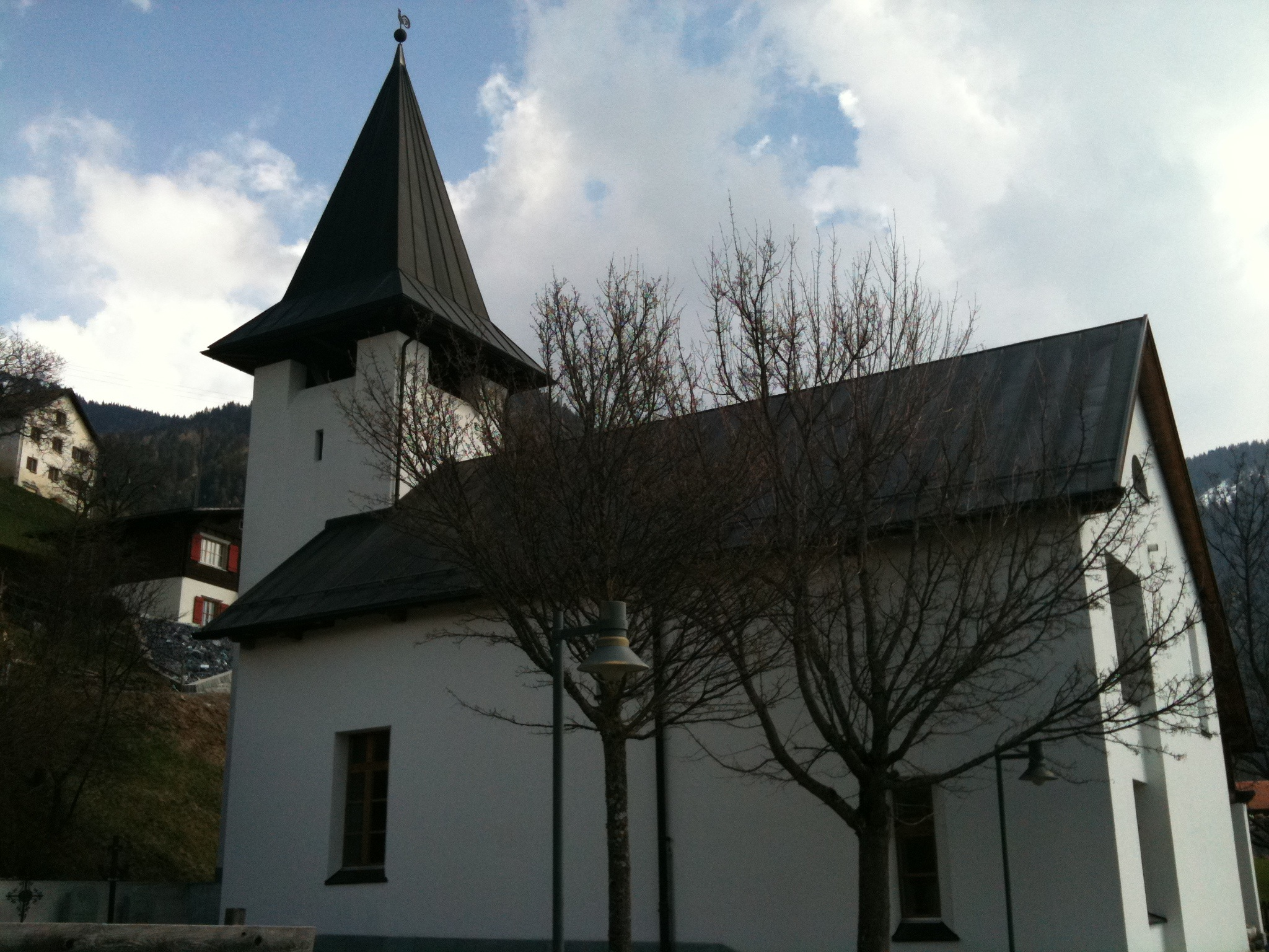 reformierte Kirche Says, Kanton Graubünden